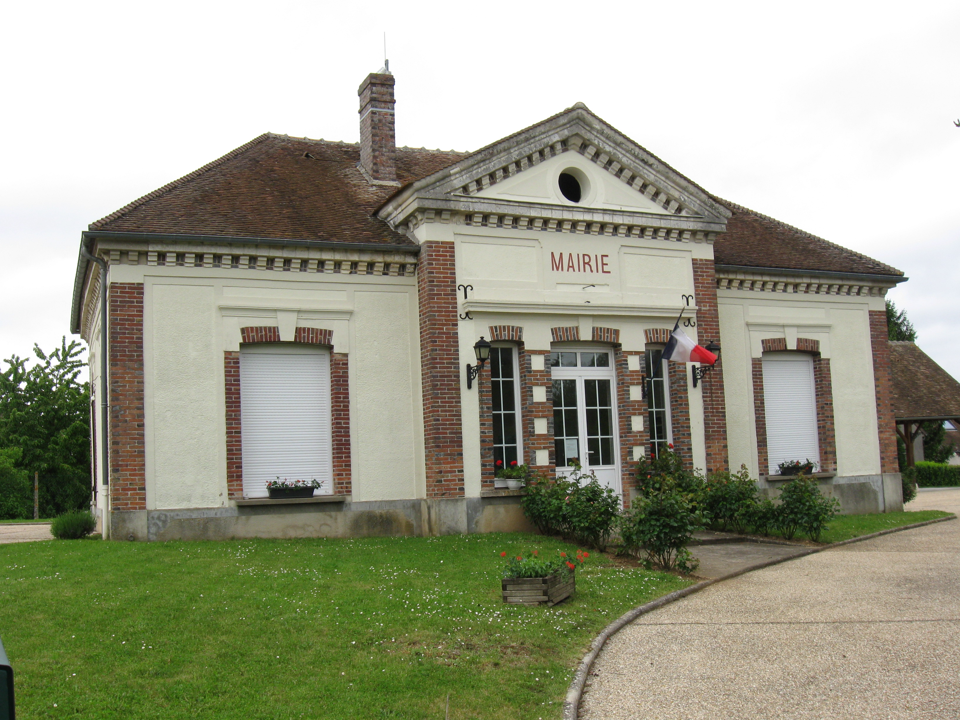 Mairie de Baby. (Seine-et-Marne, région Île-de-France).